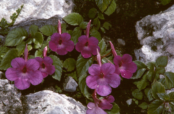 Achimenes grandiflora in Xochicalco, Morelos, Mexico